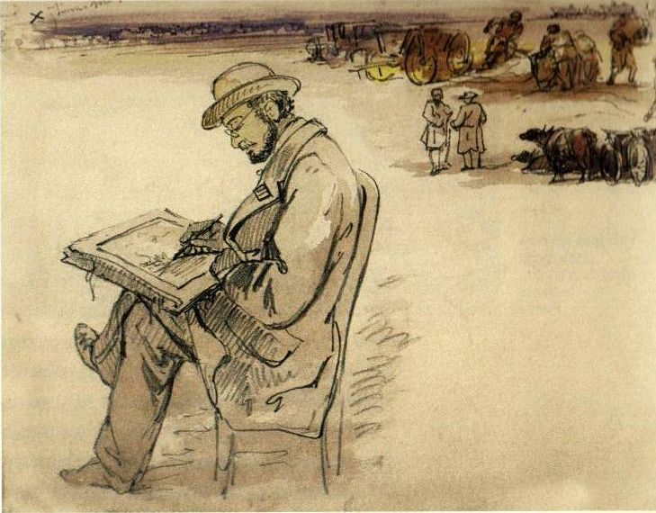 Portretul lui Carol Popp de Szathmari desenând stând pe un scaun - Muzeul Municipiului București